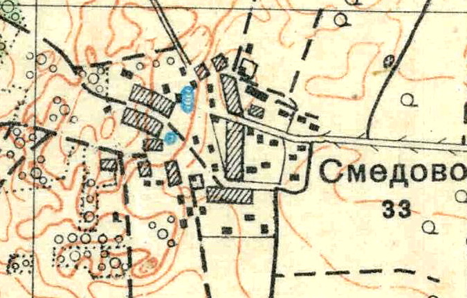 Топографическая карта Ленинградской области, квадрат О-35-23-А-г (Черенковицы), деревня Смёдово